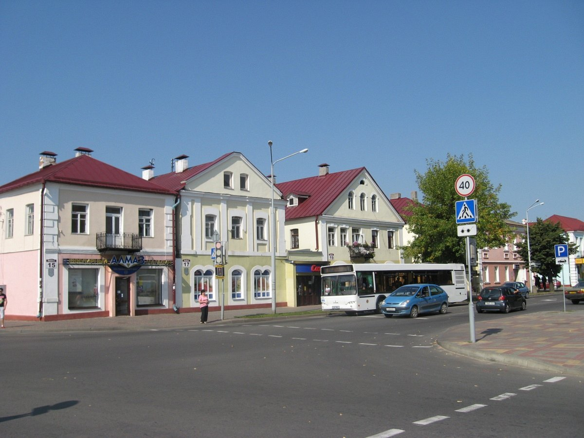 Кобрын.